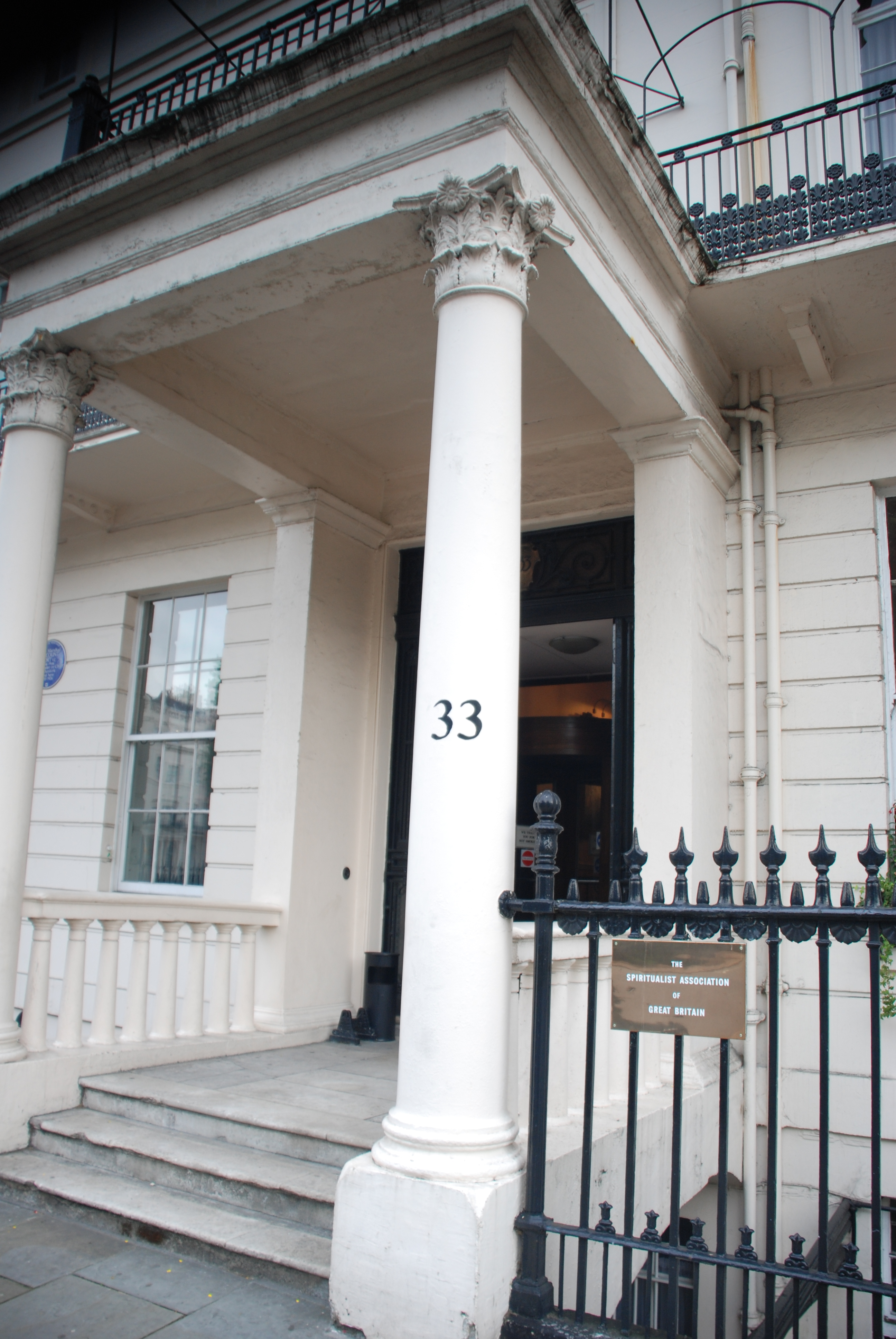 Entrée de l'immeuble de l'association spiritualiste de Grande Bretagne. 33 Belgrave Square, Londres